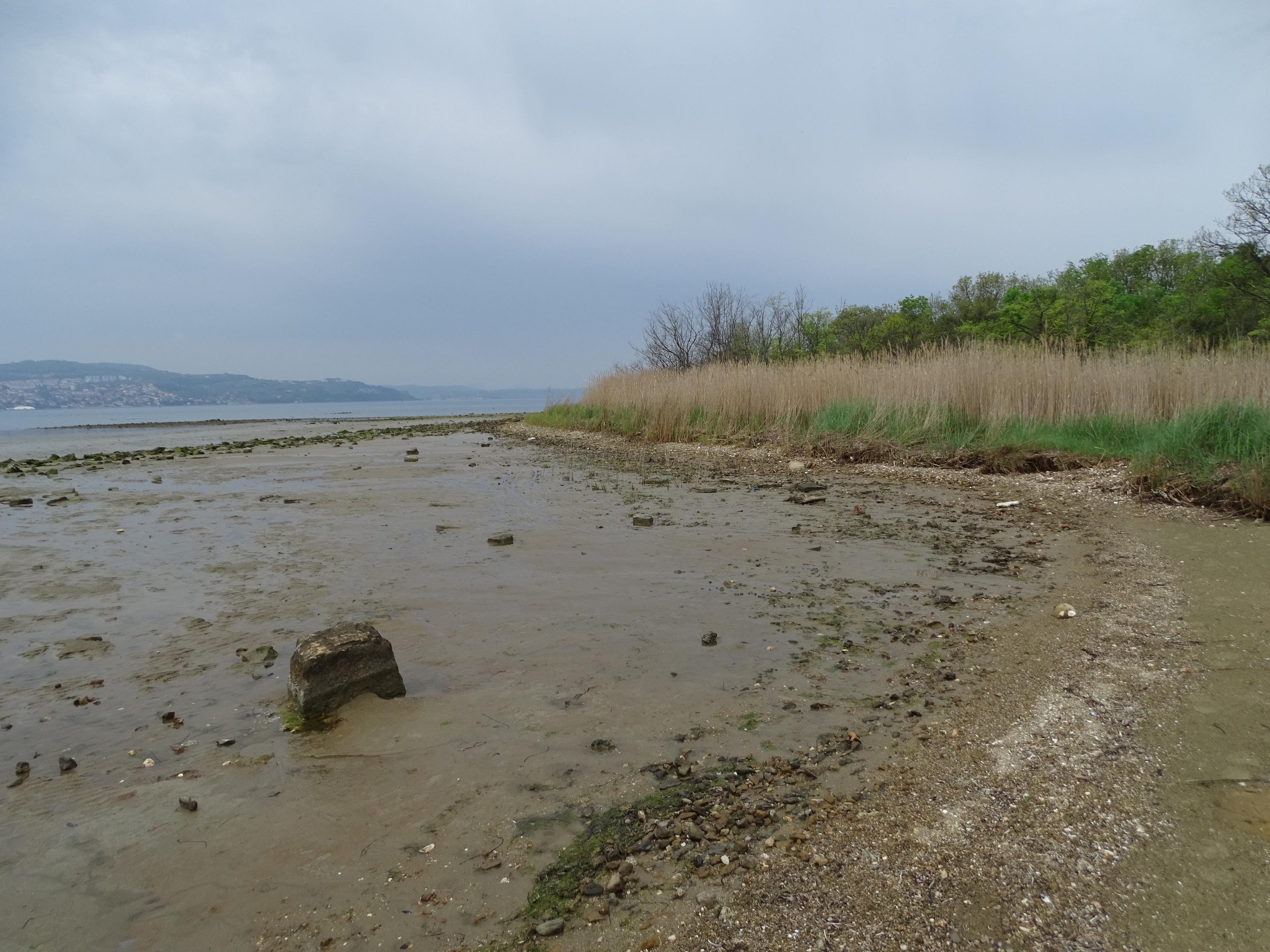 Obrežno mokrišče pri SV. Nikolaju v Ankaranu.